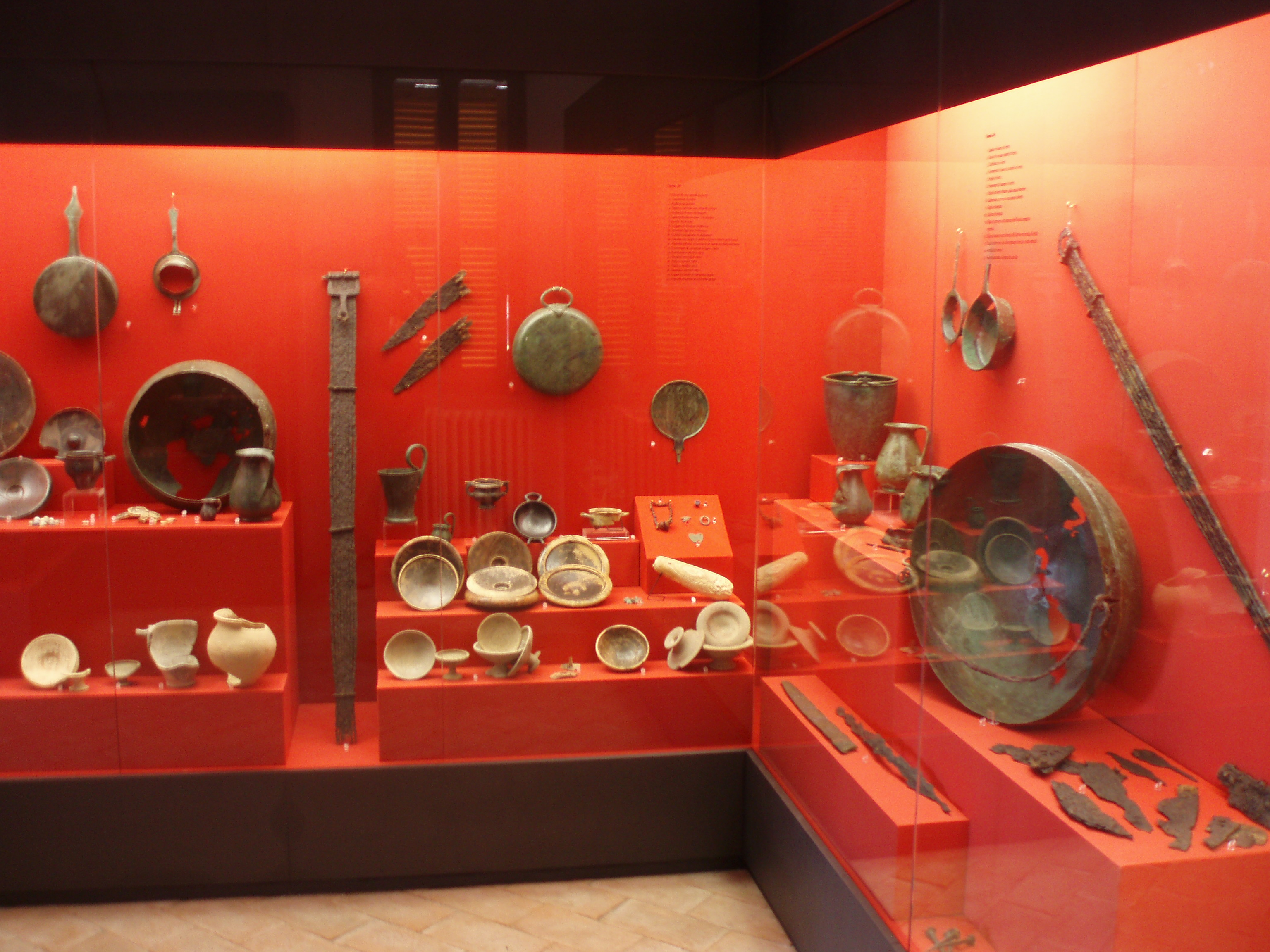 Museo archeologico statale di Arcevia - 1